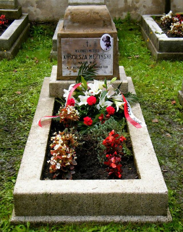 Zdjęcie nagrobka z sierpnia 2014r.